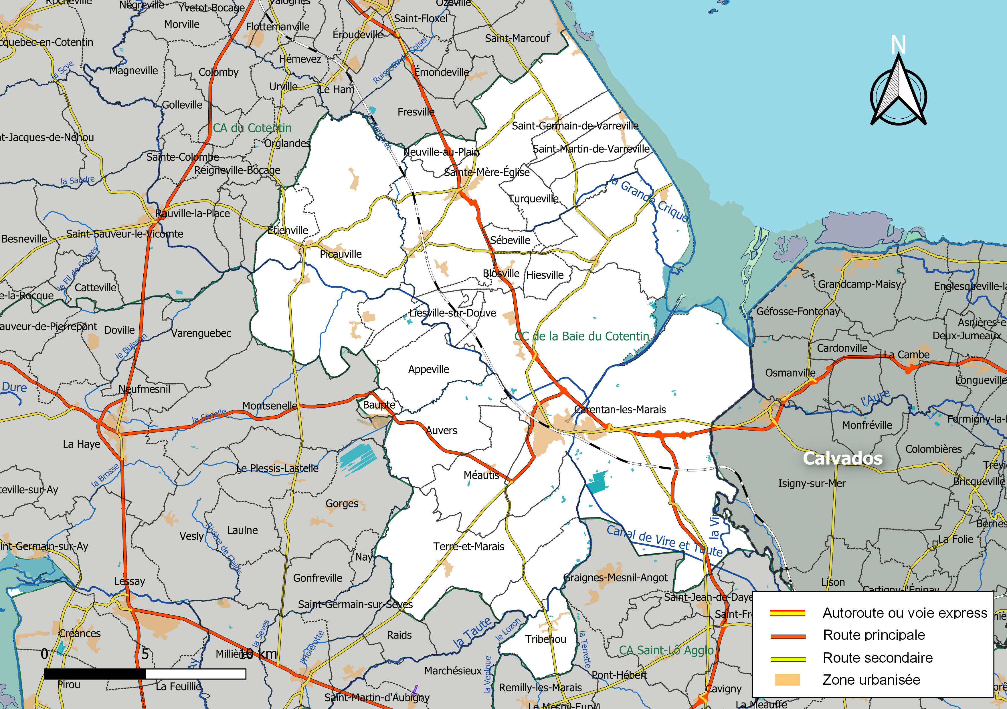 Carte géographique de la Communauté de communes de la Baie du Cotentin, département de la Manche, France. Composition au 1er janvier 2019.